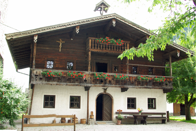 Heimatmuseum